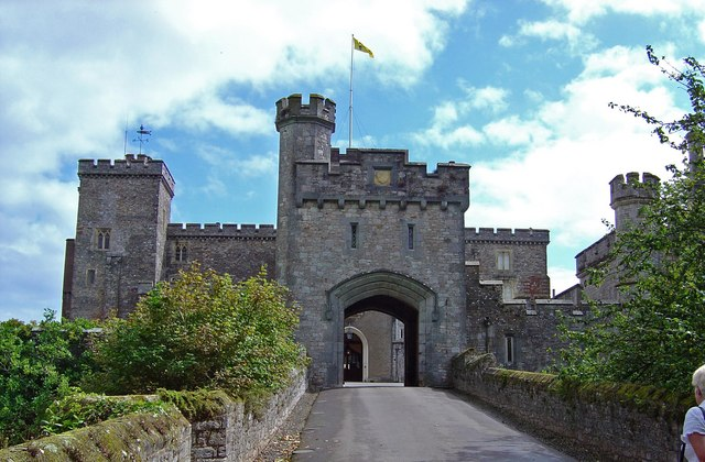 Powderham Castle, nr Exeter,Devon.